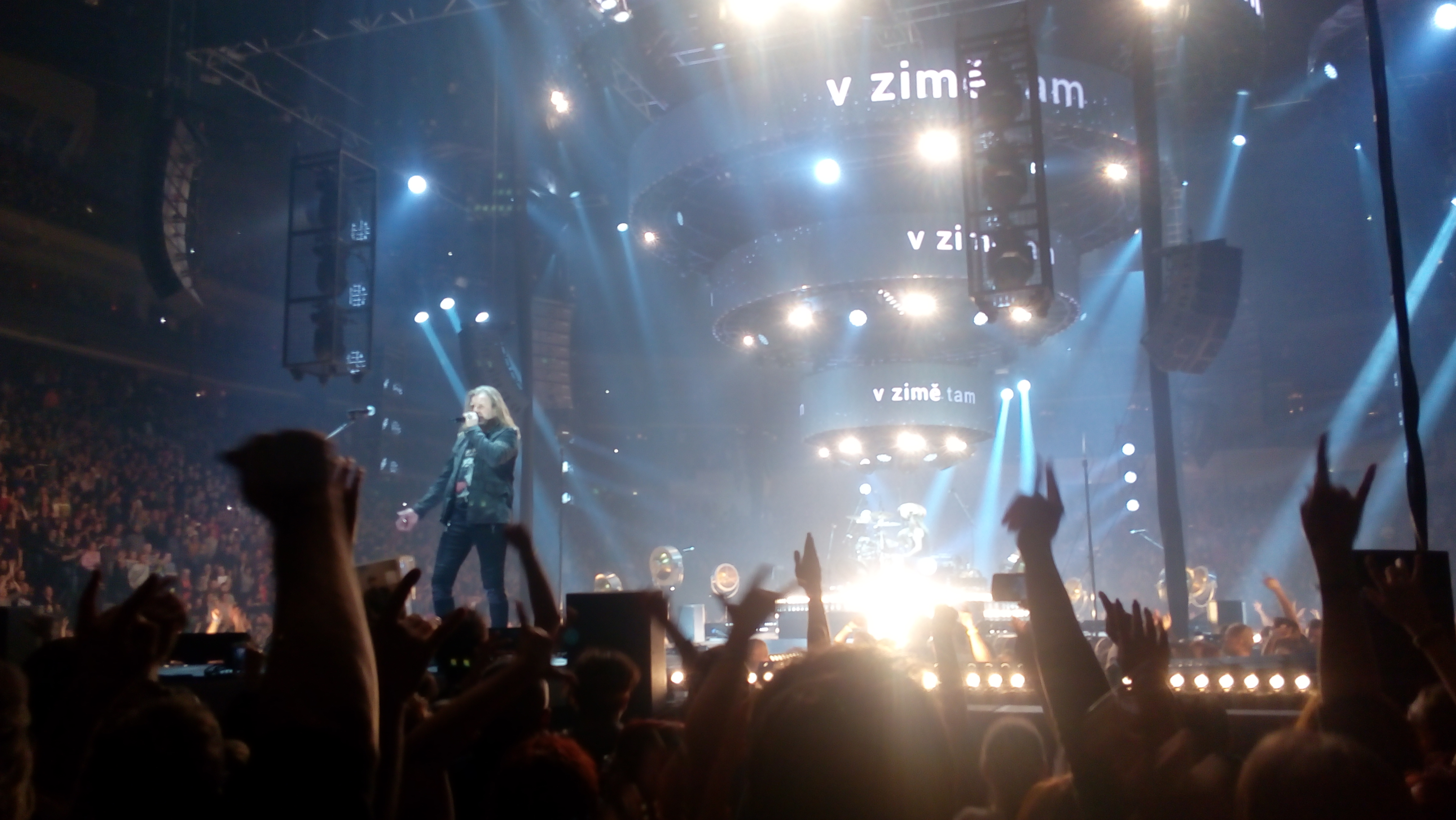 Skupina Kabát během vyprodaného koncertu v pražské O2 areně 28. 11. 2017